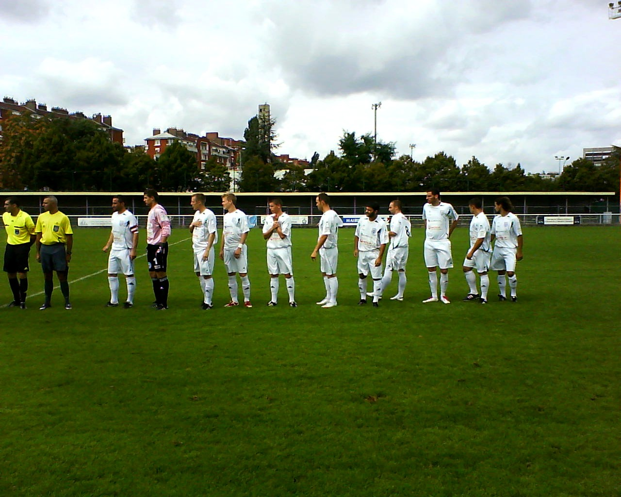 Présentation de l'équipe lors du match Paris FC B-Dieppe du 29 août 2010